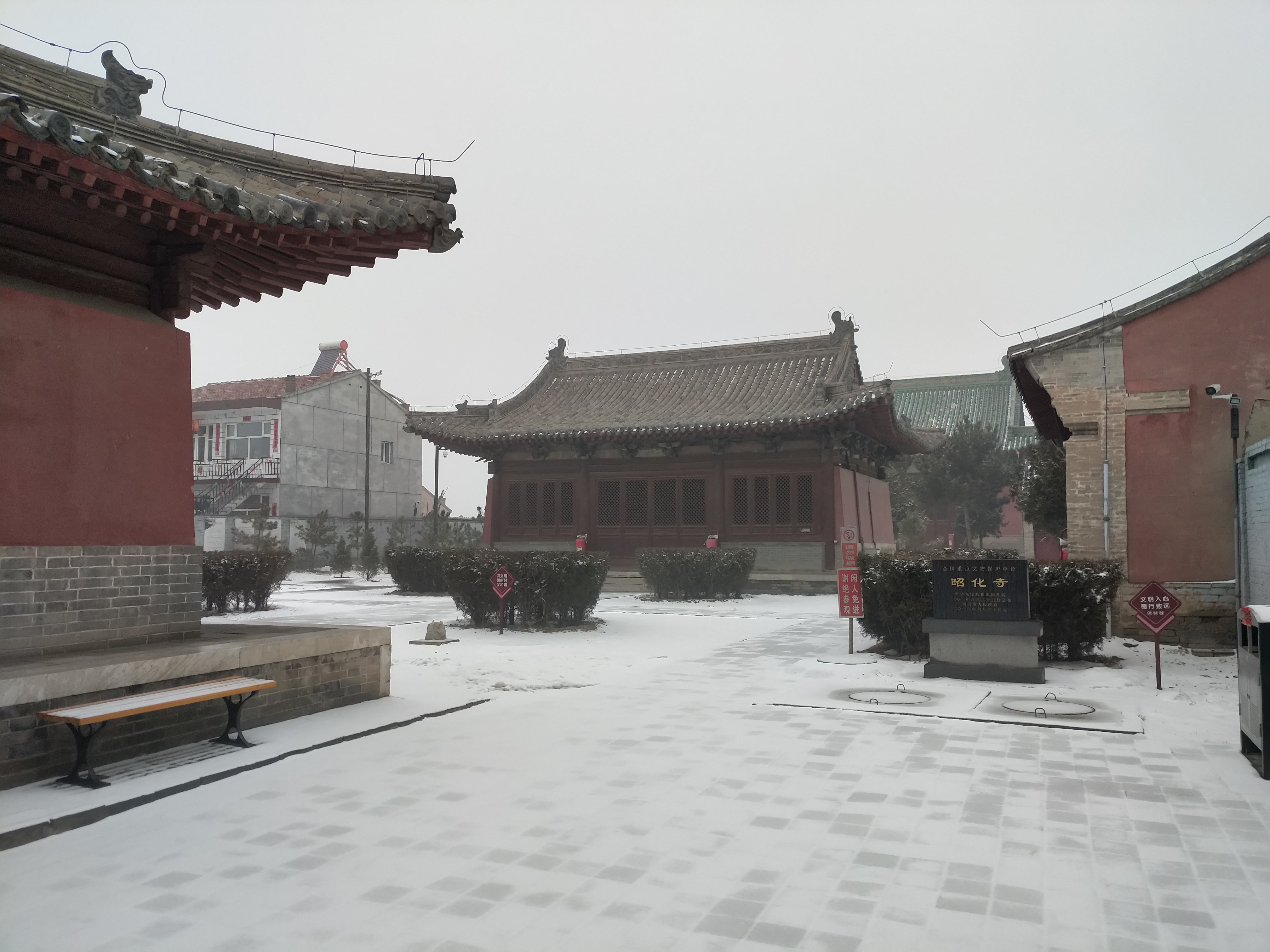 全国文保单位昭化寺